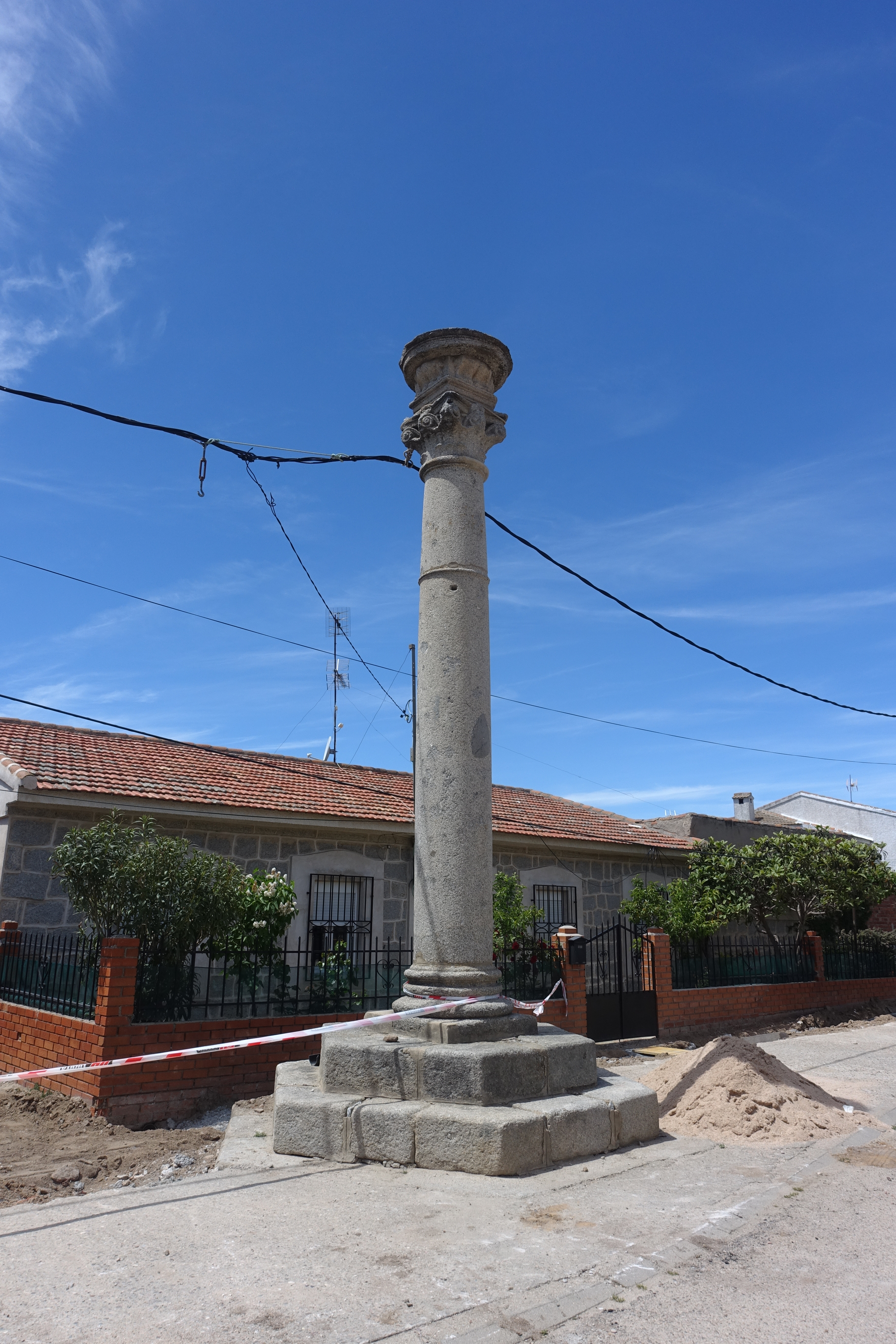 Rollo de justicia en Cuerva (Toledo, España).